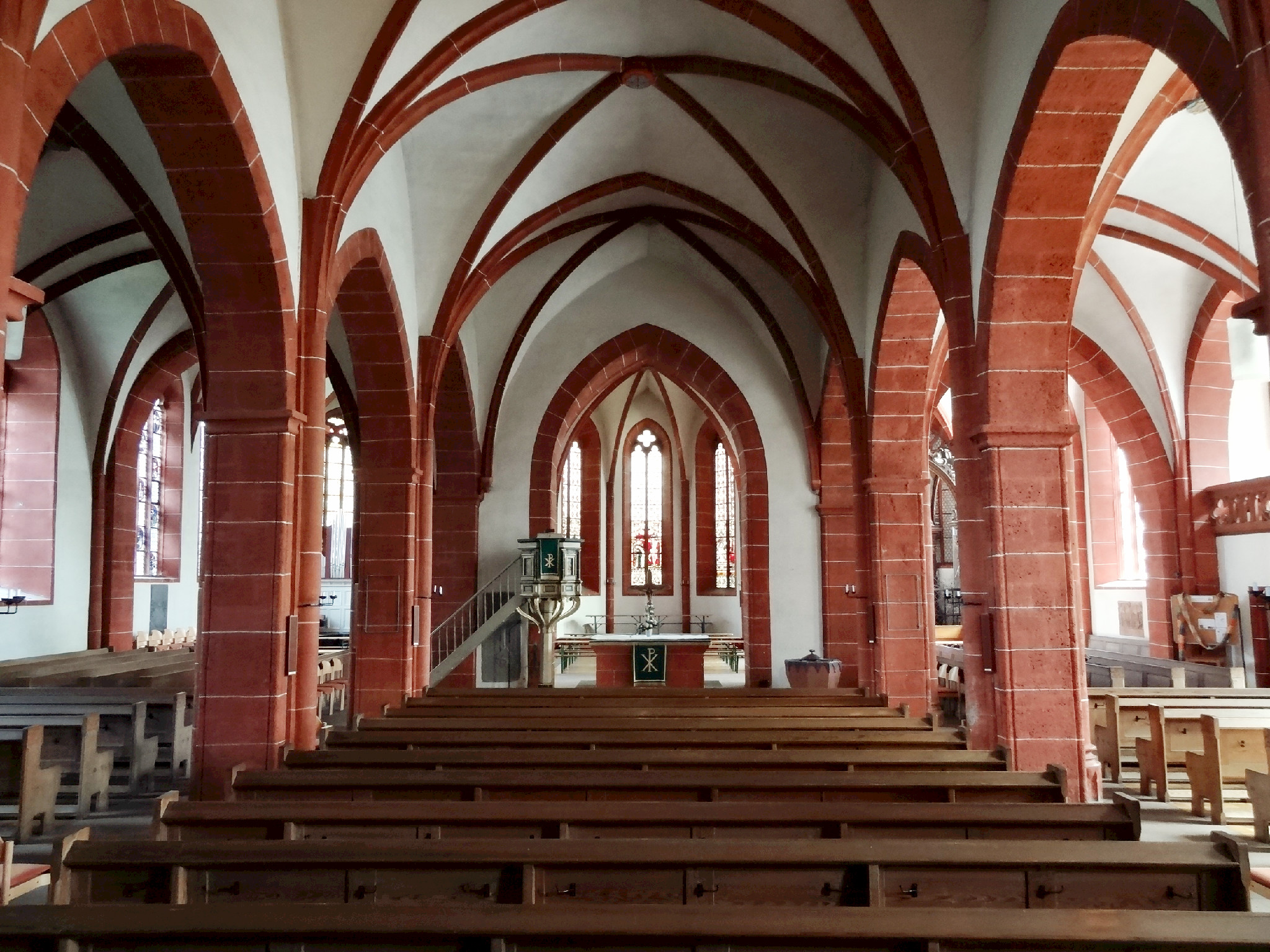 Blick durch das Mittelschiff nach Osten